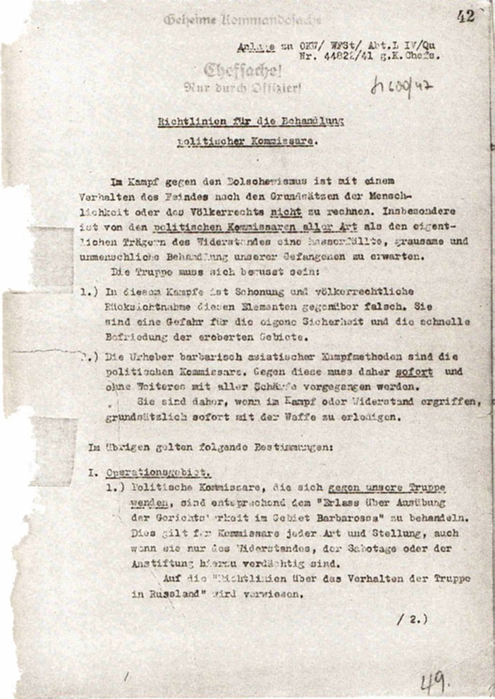 Scans der Richtlinie des sogenannten Kommissarbefehls, Gemeinfrei da deutsches amtliches Dokument